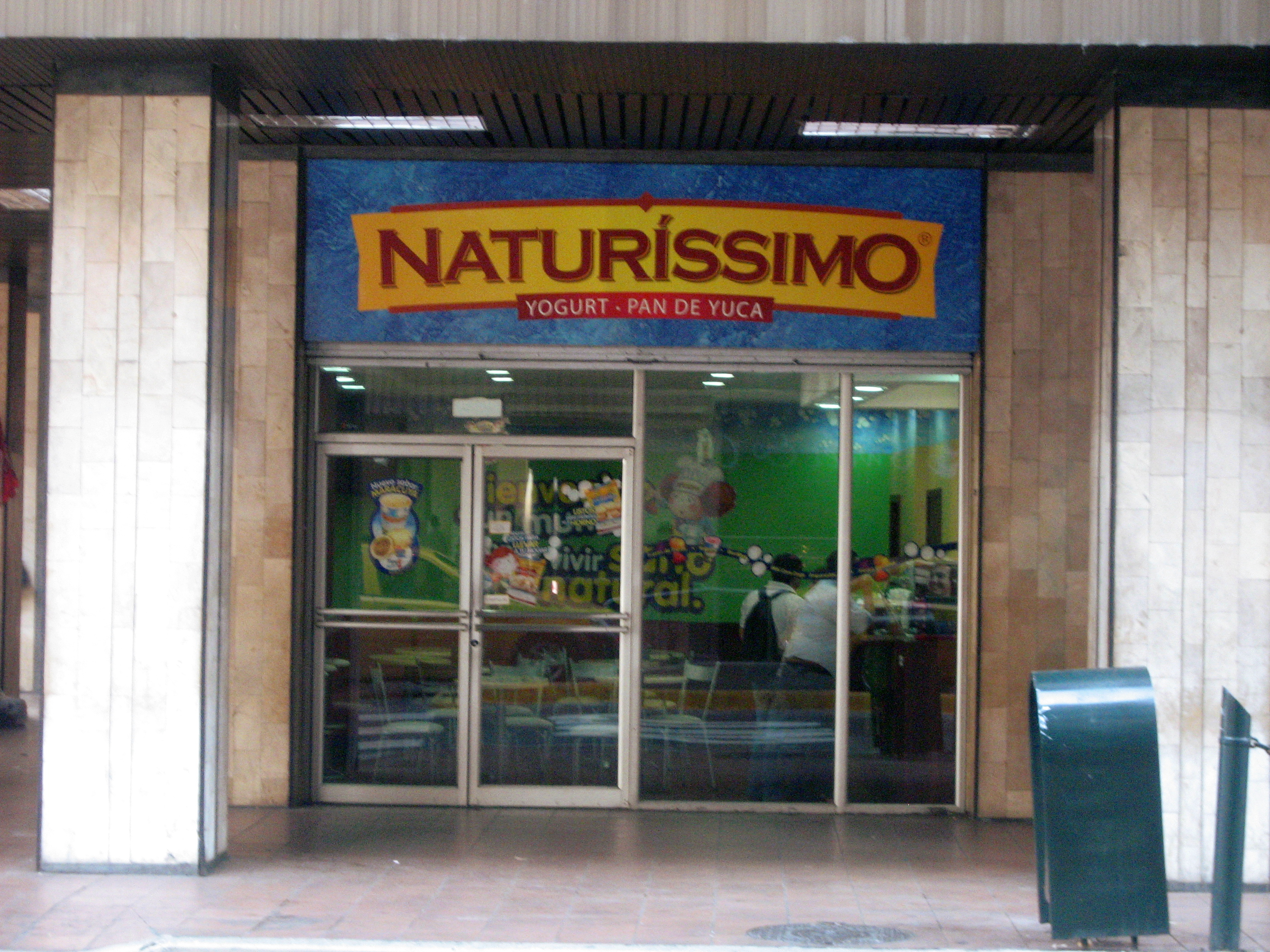 Local de Naturissimo en el centro de Guayaquil.